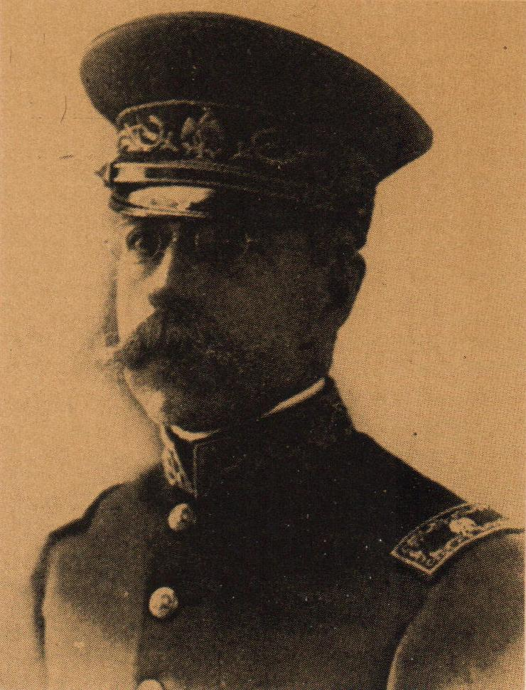 General Amado Aguirre Santiago